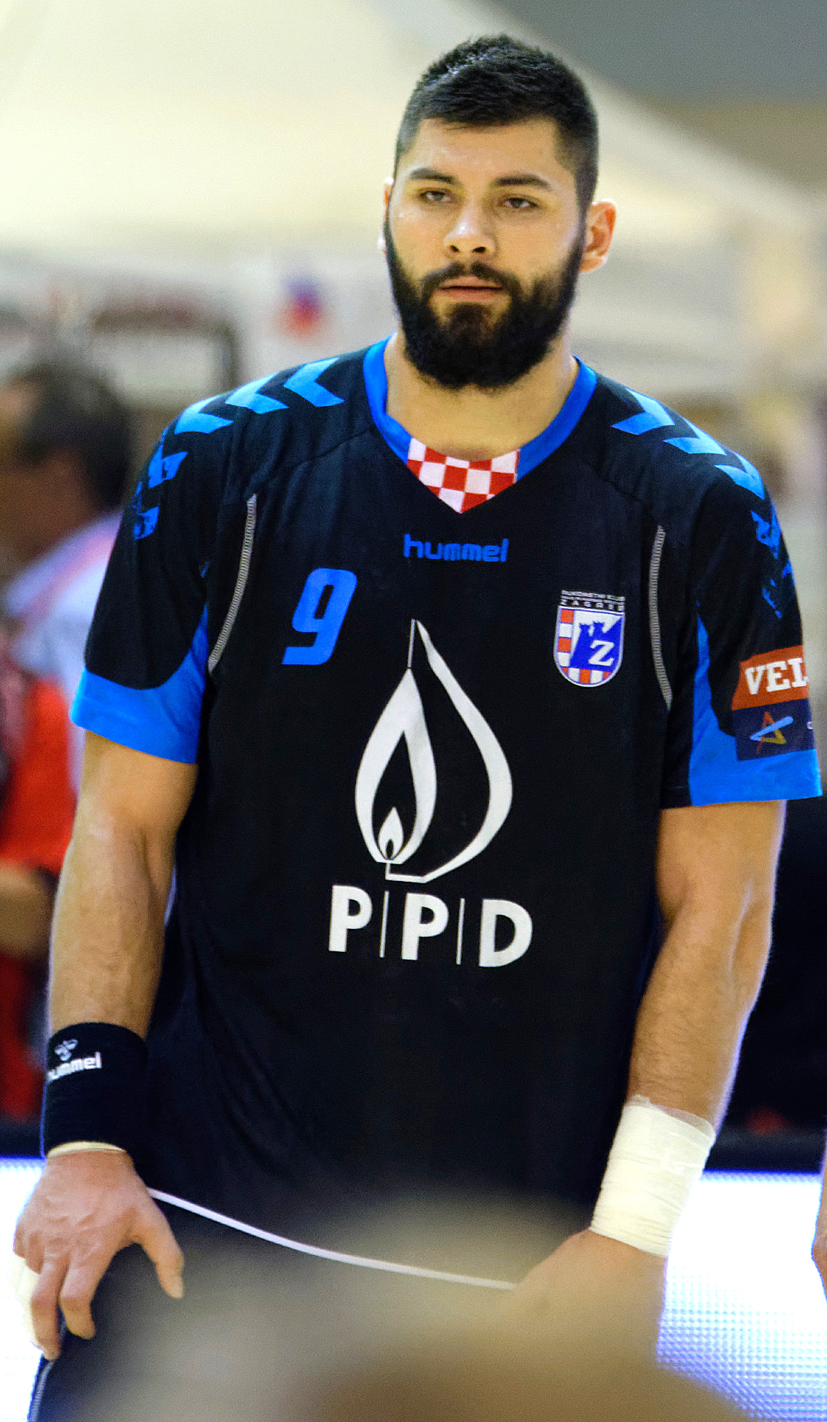 Rencontre du challenge Marrane 2016 entre l'US Dunkerque et les croates du RK Zagreb